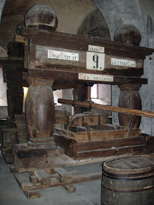 Historische Weinkelter von 1801